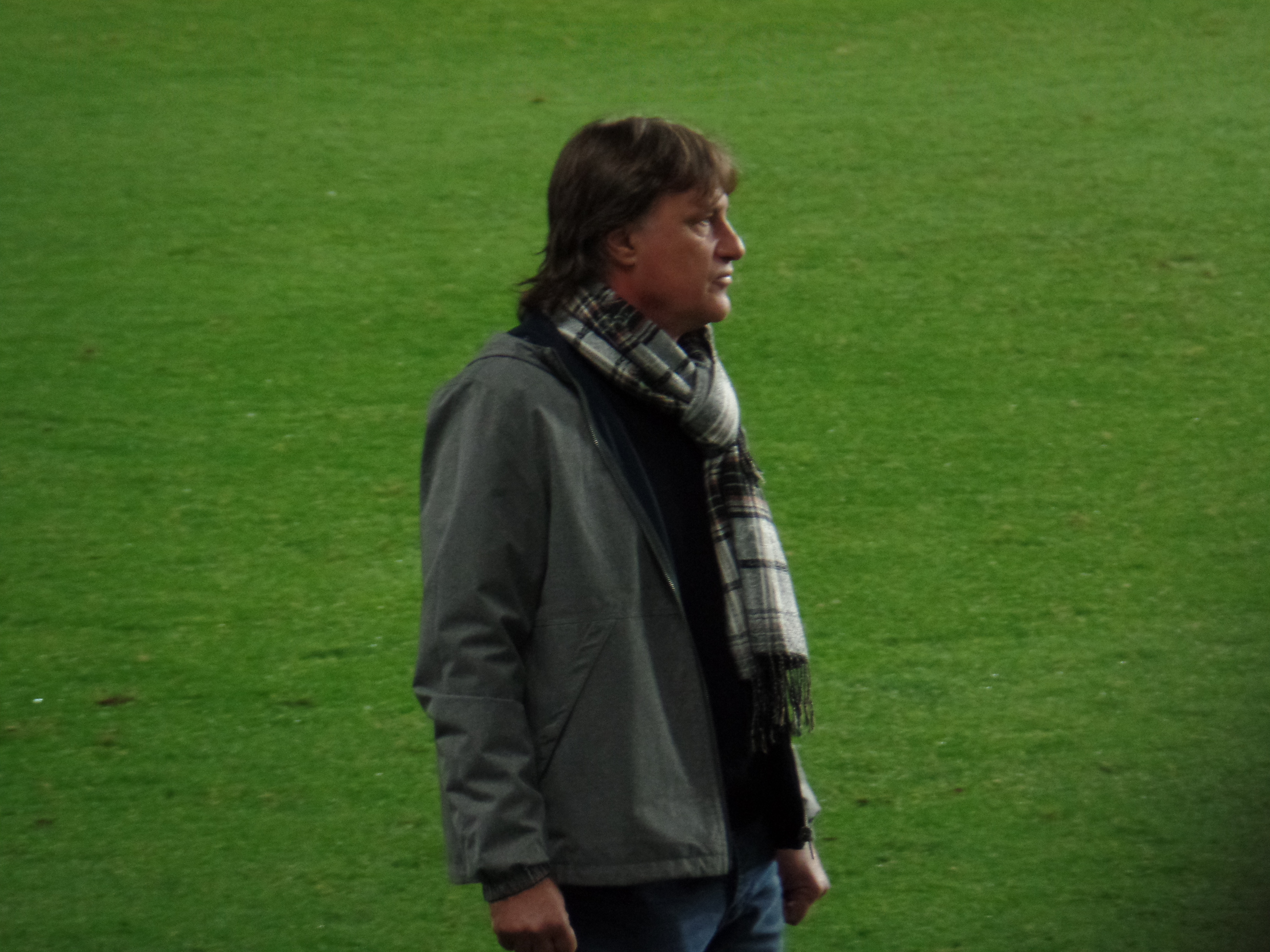 סלובודאן דרפיץ 2018